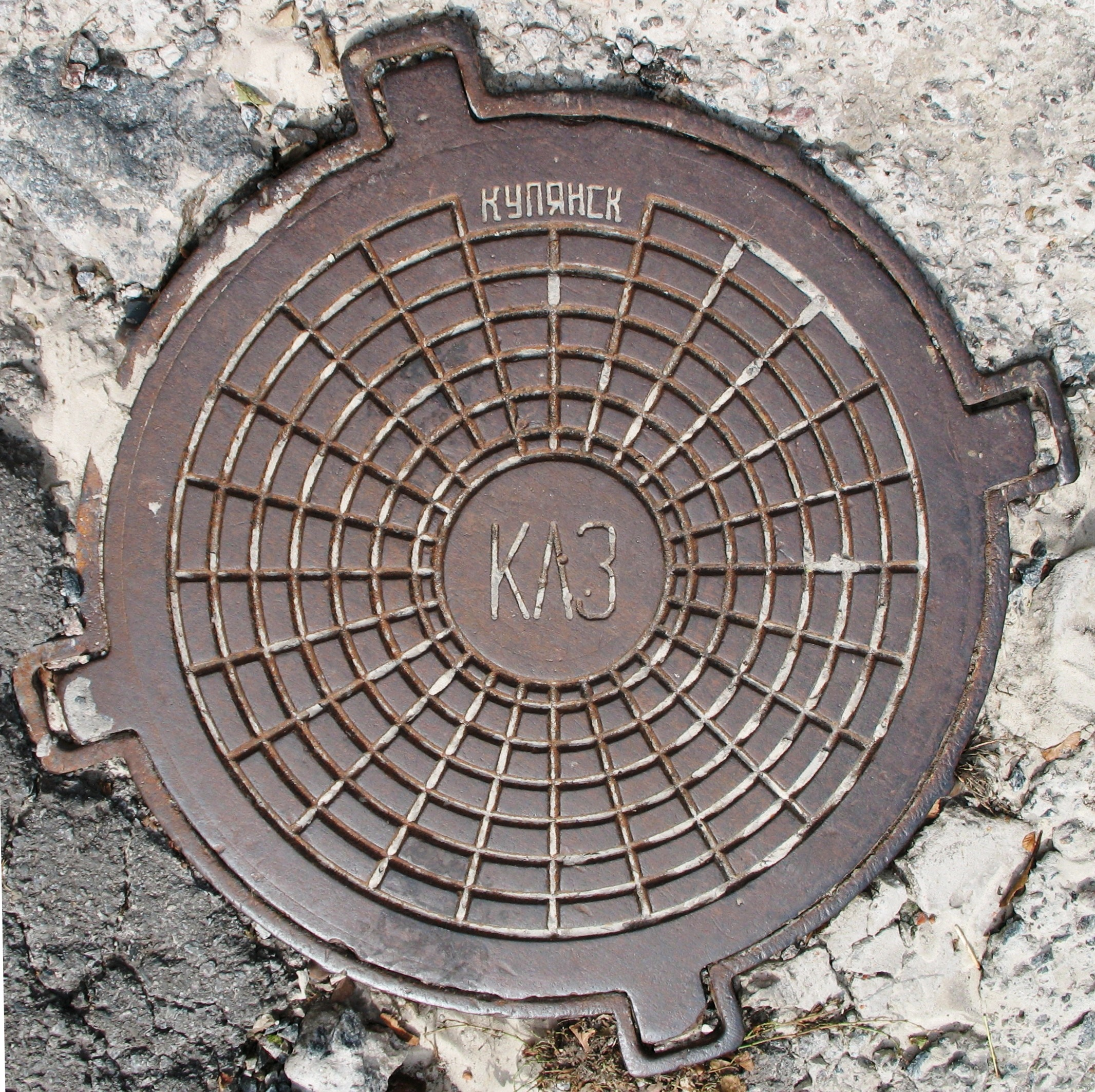 Стальная либо чугунная крышка канализационного люка, производства Купянского литейного завода (КЛЗ). СССР. В Харькове, ул.Труфанова.